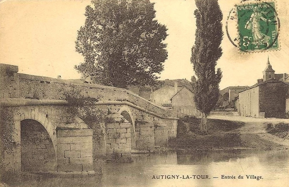 Le pont romain vers 1910.